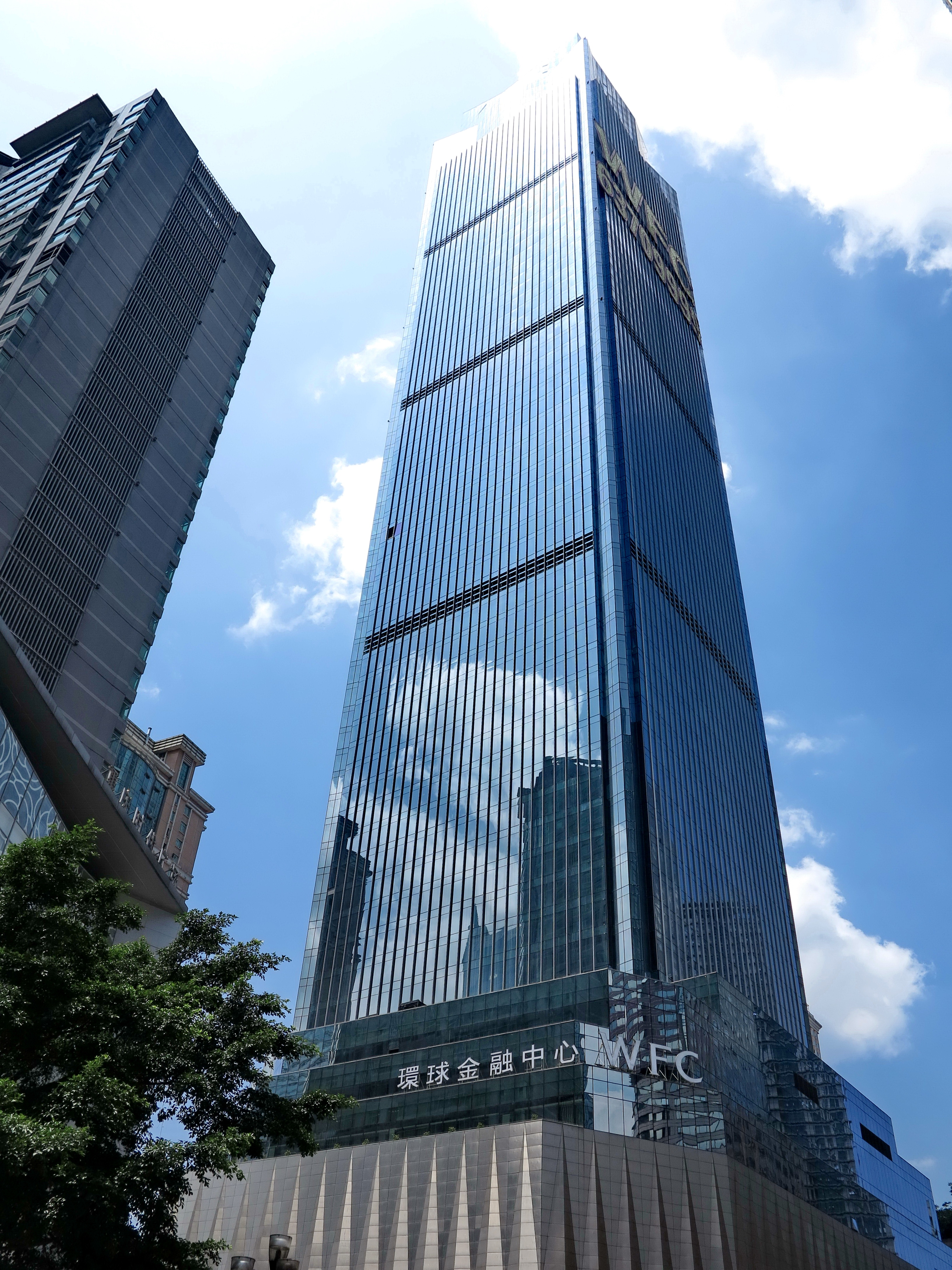 重庆的蓝天- 环球金融中心